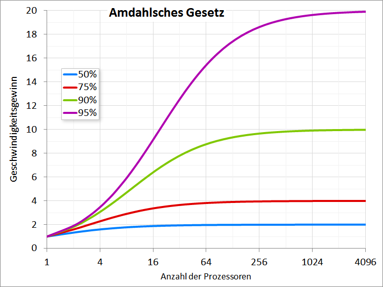 Visualisierung von Amdahl's Gesetz